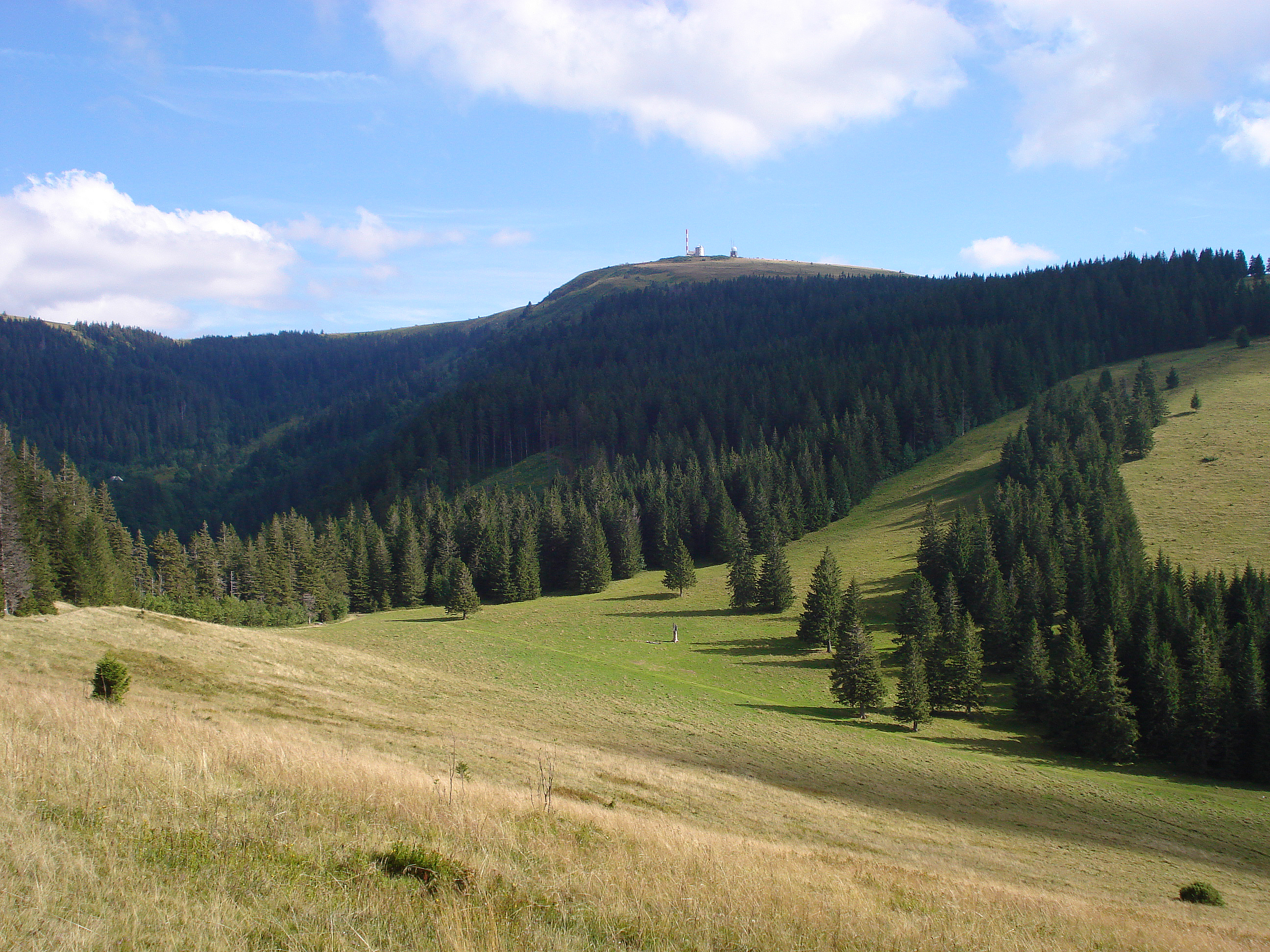 Feldberg im Schwarzwald aus Richtung NNW